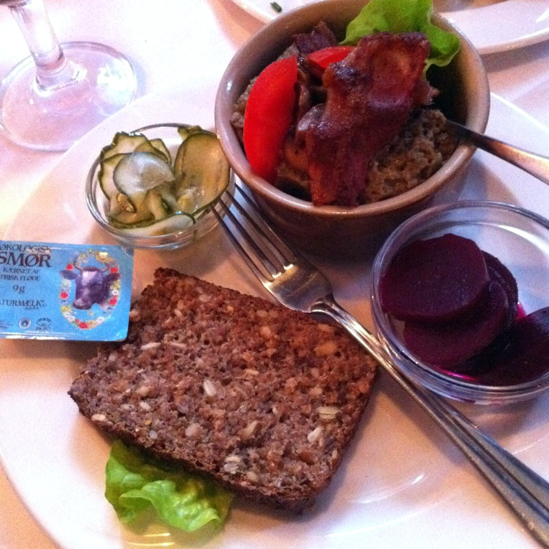 Smørrebrød zum Selbstzubereiten durch den Gast; hier mit Vollkornbrot, Butter (dänisch Smør), Leberpastete (dänisch Leverpostej) vom Schwein (mit Bacon und Tomatengarnitur), Gurken und Rote Bete.